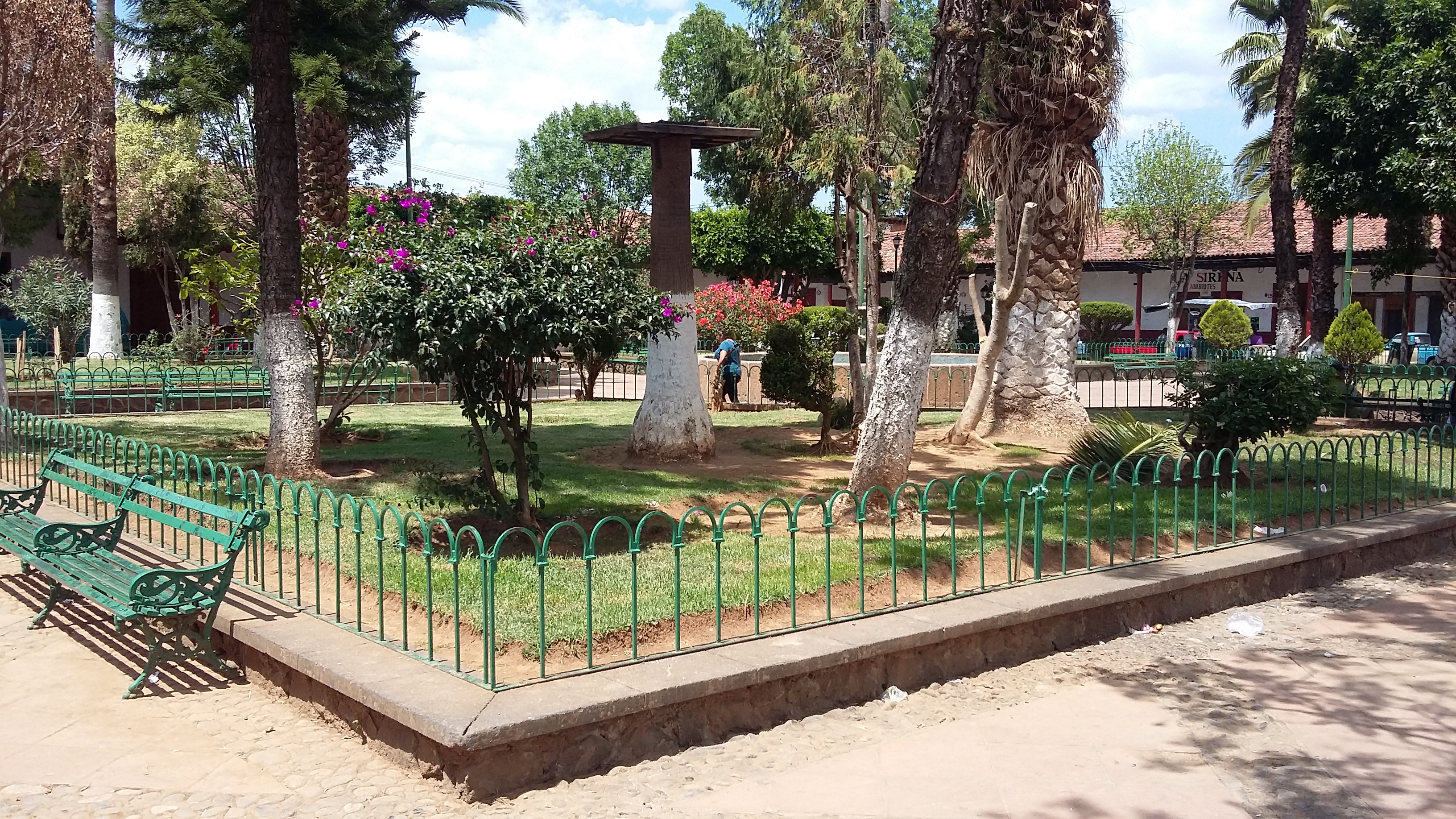 Plaza principal de Erongarícuaro